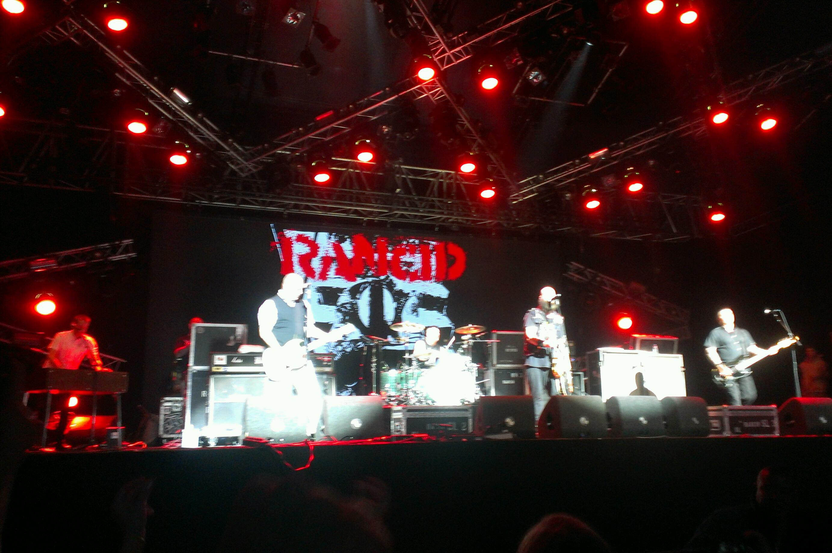 Optreden van Rancid op dag 2 van Pinkpop 2017